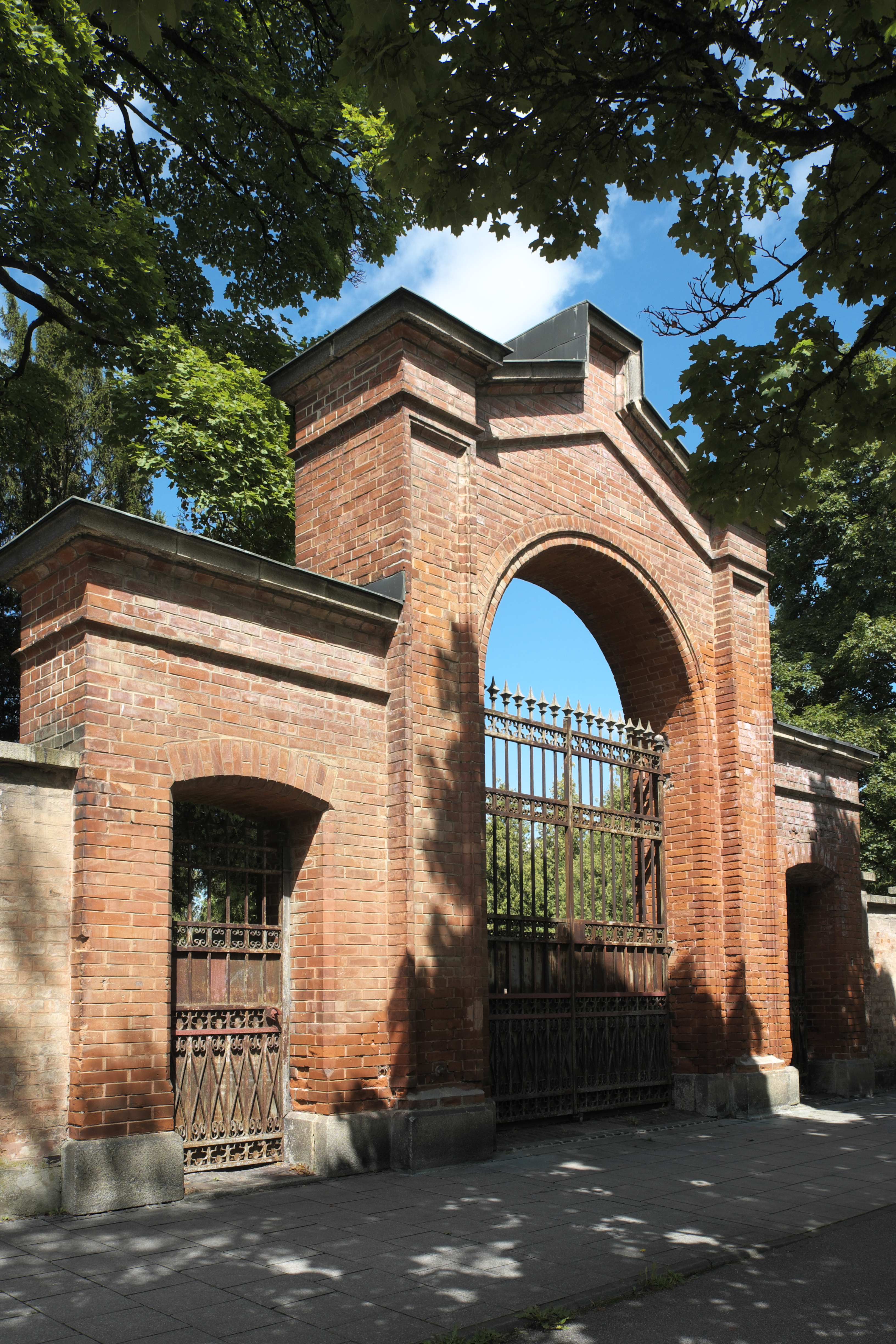 Alter Israelitischer Friedhof (München) im Stadtbezirk Sendling in München (Bayern/Deutschland)